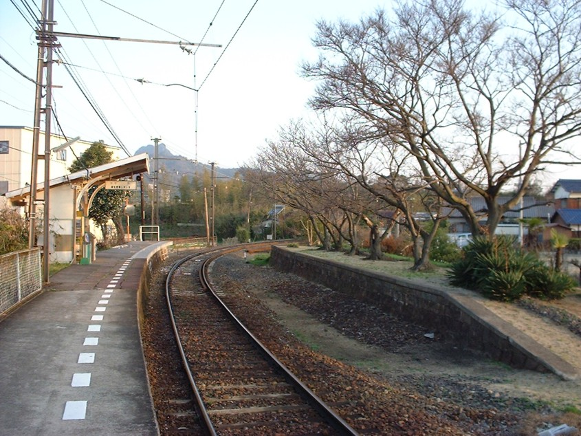 北側（浜手）に旧ホームの遺構を残す房前駅 西望